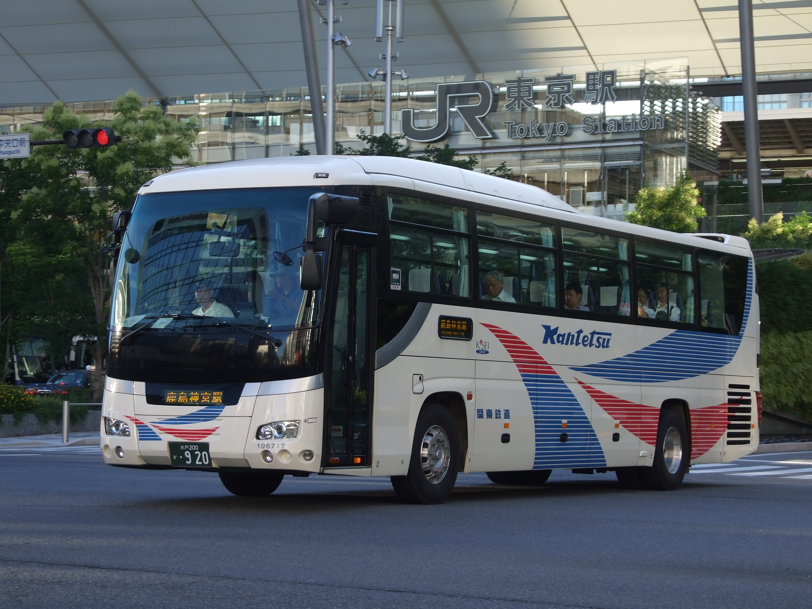 かしま号で運用されるPKG-RU1ESAJ